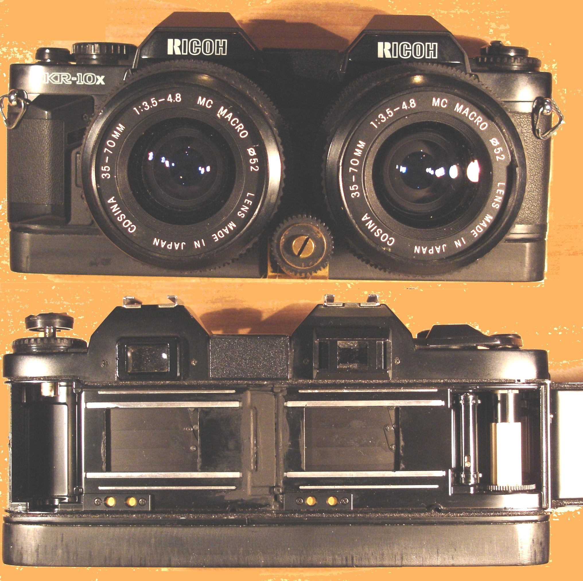 Stereocamera. Deze camera is gebouwd door twee spiegelreflexcamera's door te zagen en aan elkaar te lijmen; er gaat één film in.